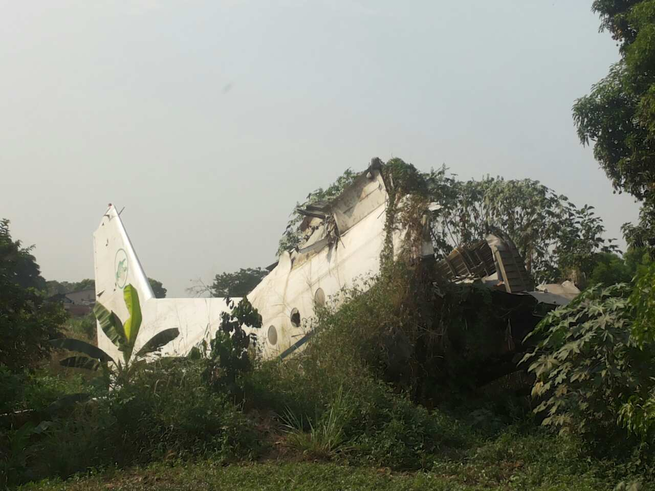 vliegtuig